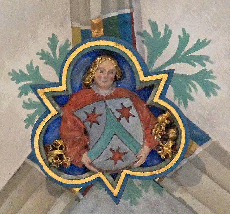 Schlussstein im Netzgewölbe des Chors der Bartholomäuskirchein Markgröningen von Aberlin Jörg, Baumeister (letztes Motiv (Nr. 8) von West nach Ost